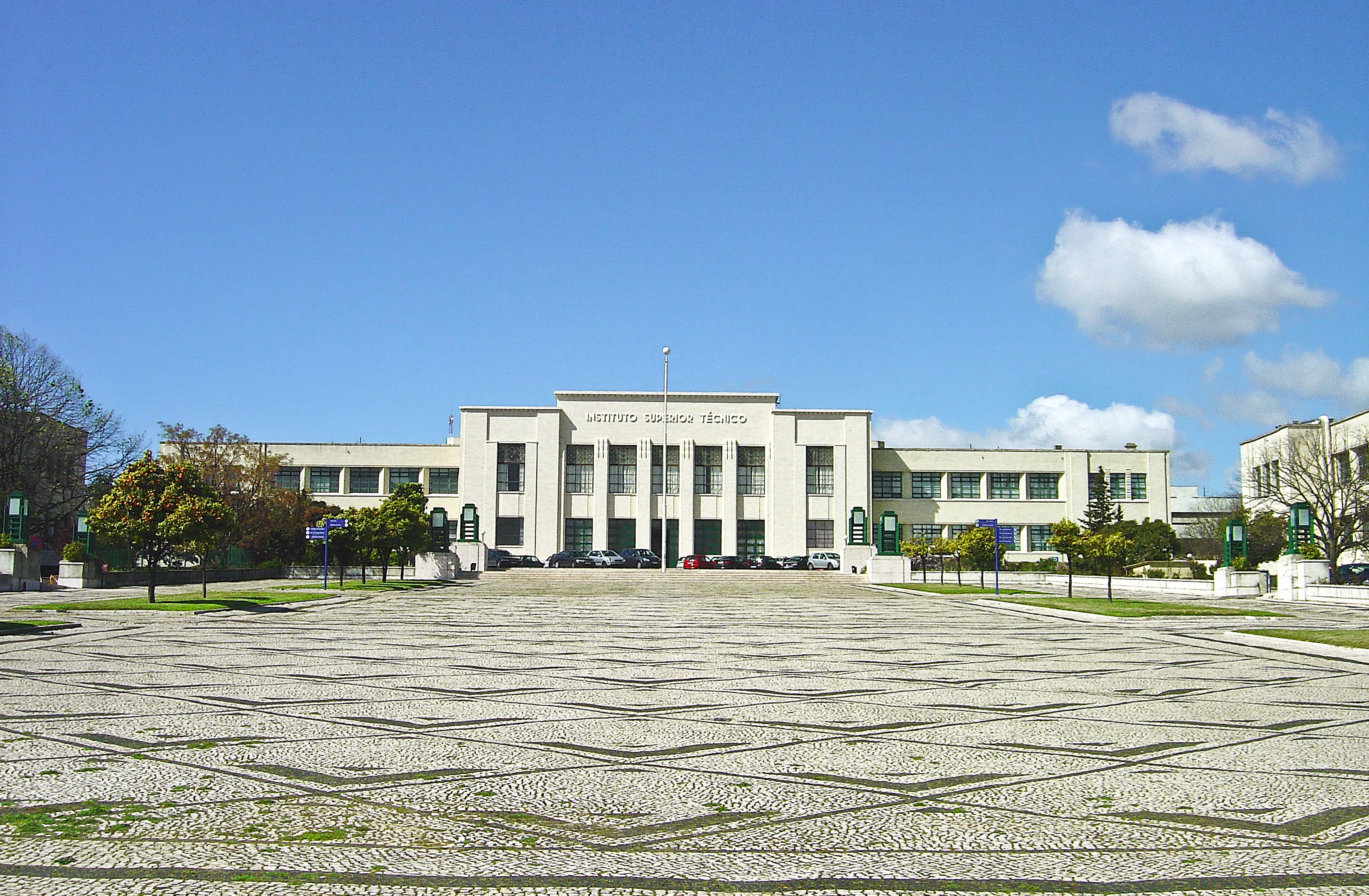 O Novo Instituto iria realizar, pela primeira vez em Portugal, a união harmoniosa da arquitectura com a engenharia. (...) A construção forneceu ainda a oportunidade de testar novos materiais e de experimentar com uma concepção flexível de espaço. A modernidade da traça dos edifícios do Técnico reflectia-se na funcionalidade do interior; a decoração escorreita, própria da época (art déco) não tinha nada de gratuito, antes se ajustava organicamente aos propósitos técnicos e funcionais. Pardal Monteiro procurou tirar partido das grandes massas de harmonia, de calma e de sobriedade que o conduzisse a obter um efeito de grandiosidade arquitectural simplesmente à custa dos volumes da construção, o que é sempre incomparavelmente mais difícil do que tentá-lo à custa da riqueza decorativa e ornamental. A implantação dos pavilhões das várias engenharias na colina altaneira debruçada sobre o vale da Avenida Almirante Reis representou a exteriorização duma ideia urbanística, fruto dum racionalismo geométrico.(retirado de "85 Anos do IST") See where this picture was taken. [?]